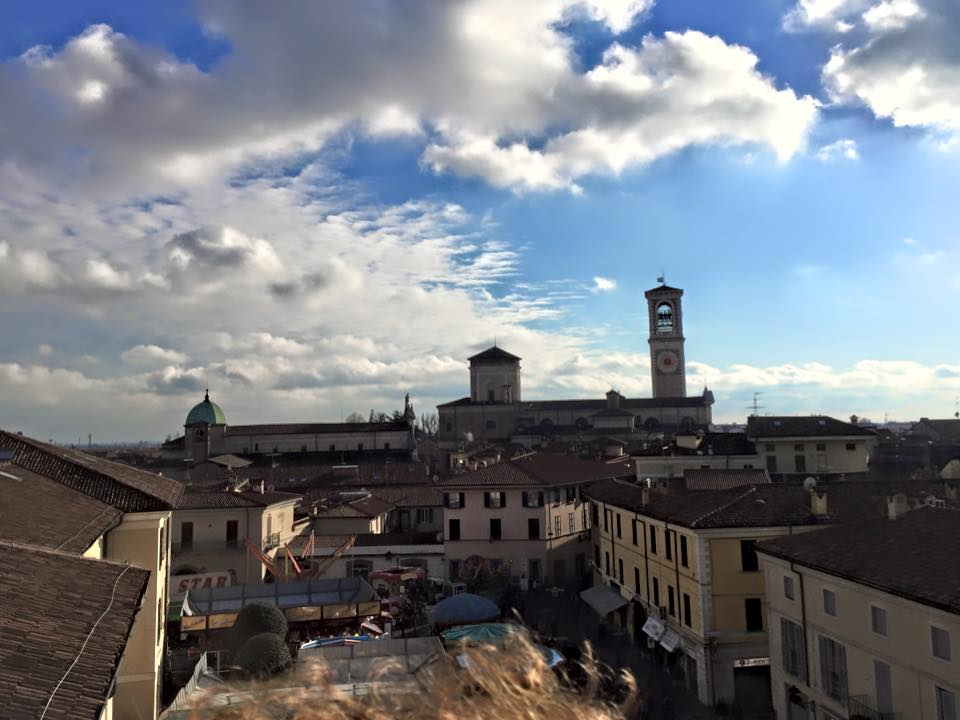 Vista di Chiari dall alto